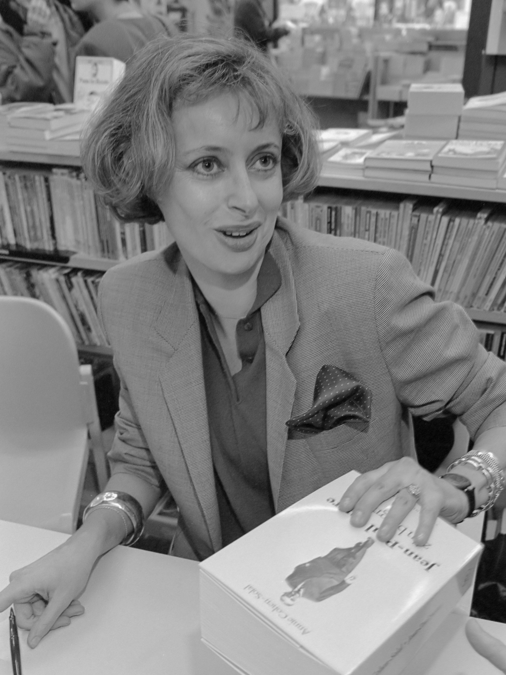 Utrecht, Franse schrijfster Annie Cohen Solal signeert haar biografie over Jean Paul Sartre 26 februari 1988